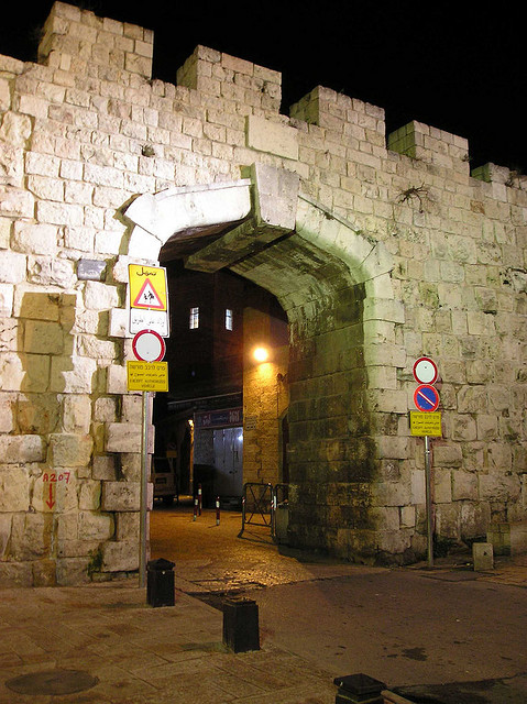 Jerusalem New Gate 2006